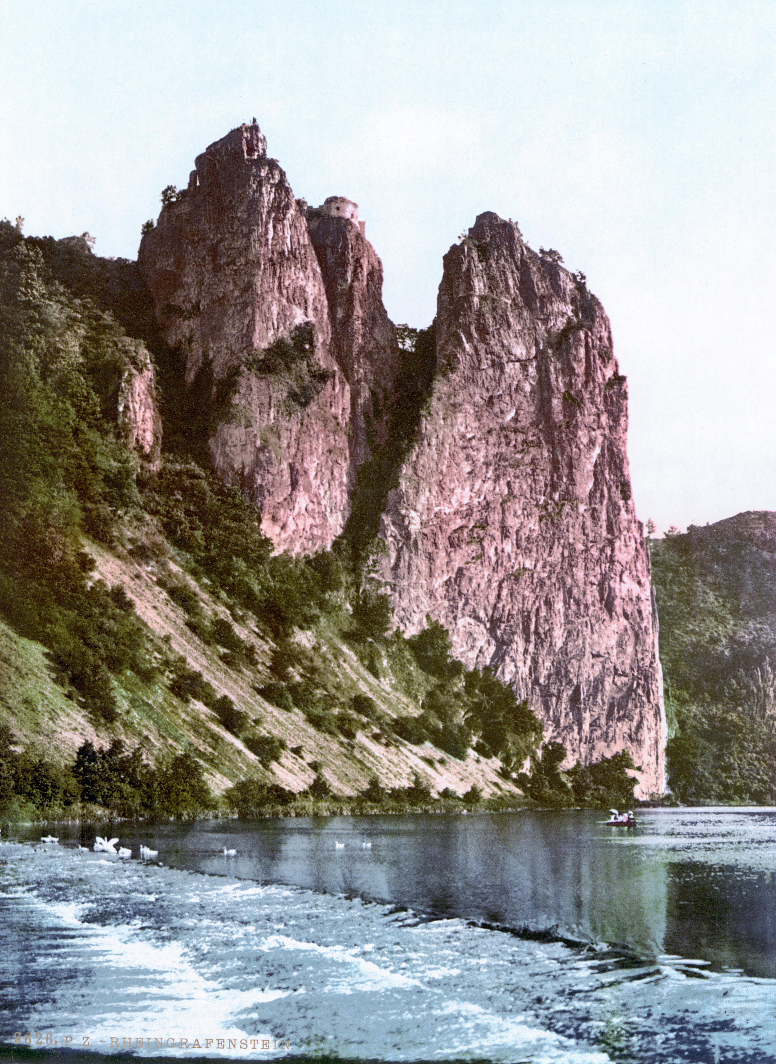 Rheingrafenstein an der Nahe um 1900, auf dem Felsen die Burgruine Rheingrafenstein